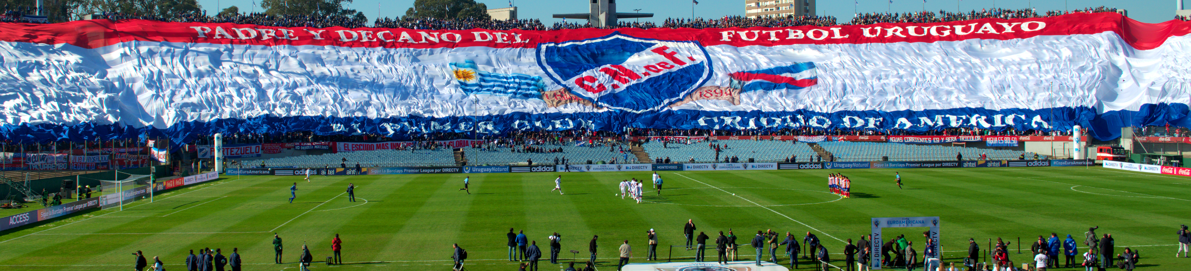 Imagen panorámica de la bandera más grande del mundo, del Club Nacional de Fotball. La foto original fue extraída de